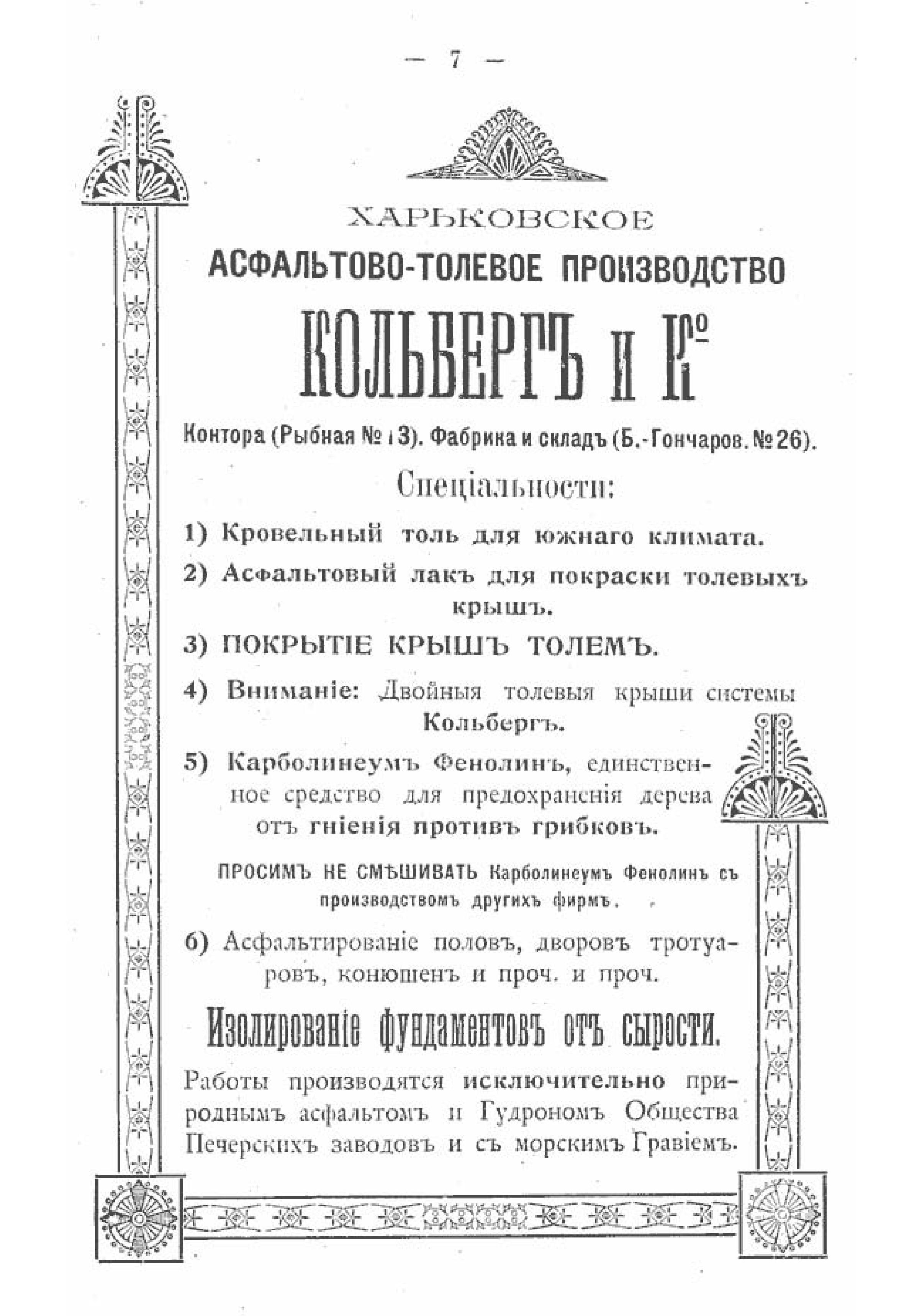 Російська імперія. Харків. 1912 рік. Реклама асфальто-толевого підприємста розташованого на вул. Великій Гончарівській. Харківський календар, випуску Харківського губернського статистичного комітету.